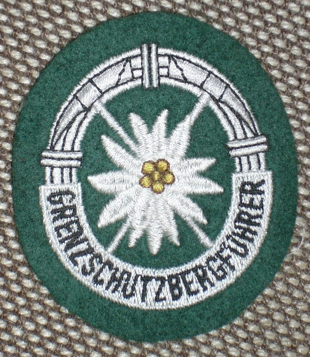 Abzeichen eines Grenzschutzbergführer (Bundesgrenzschutz), Anm.: Der Hintergrund ist kein Uniformtuch